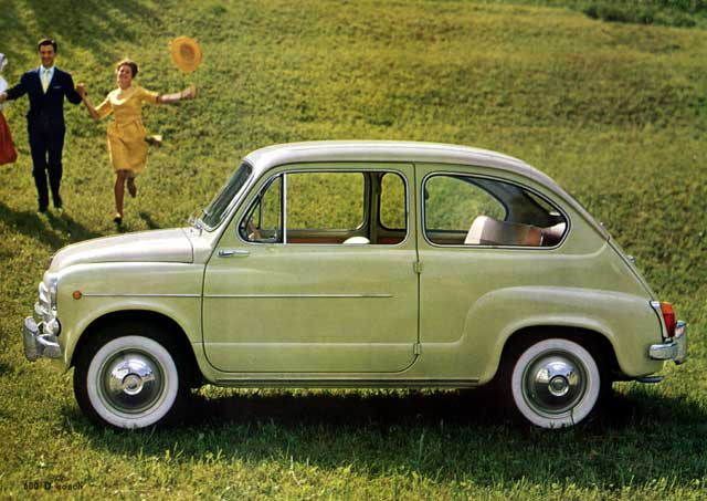 Fiat-600-d 5 (1956)